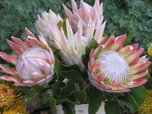 Königsprotea (Protea cynaroides).